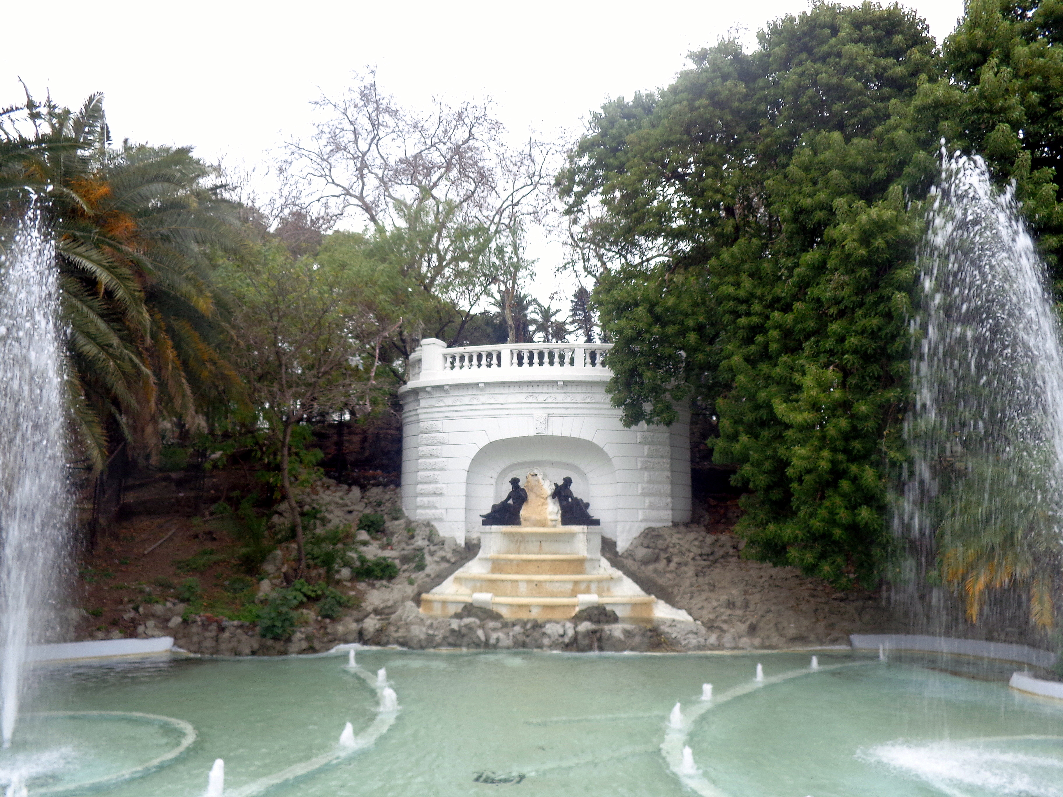 Fuente con estatuas de bronce de Neptuno y las Náyades, comprada a la casa francesa Du Val D'Osne, en Parque Lezama, Buenos Aires, Argentina.